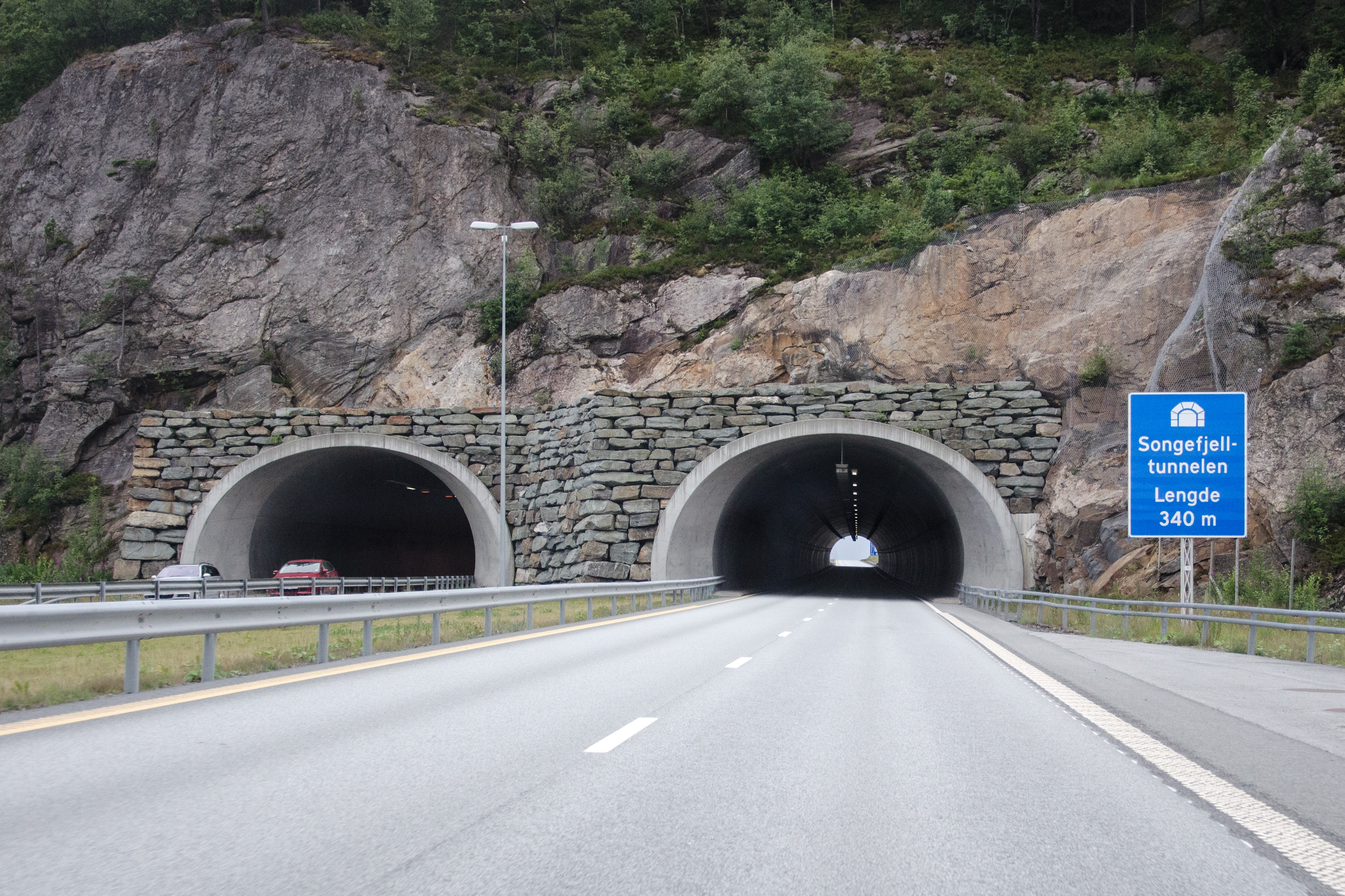 Songefjelltunnelen på E18